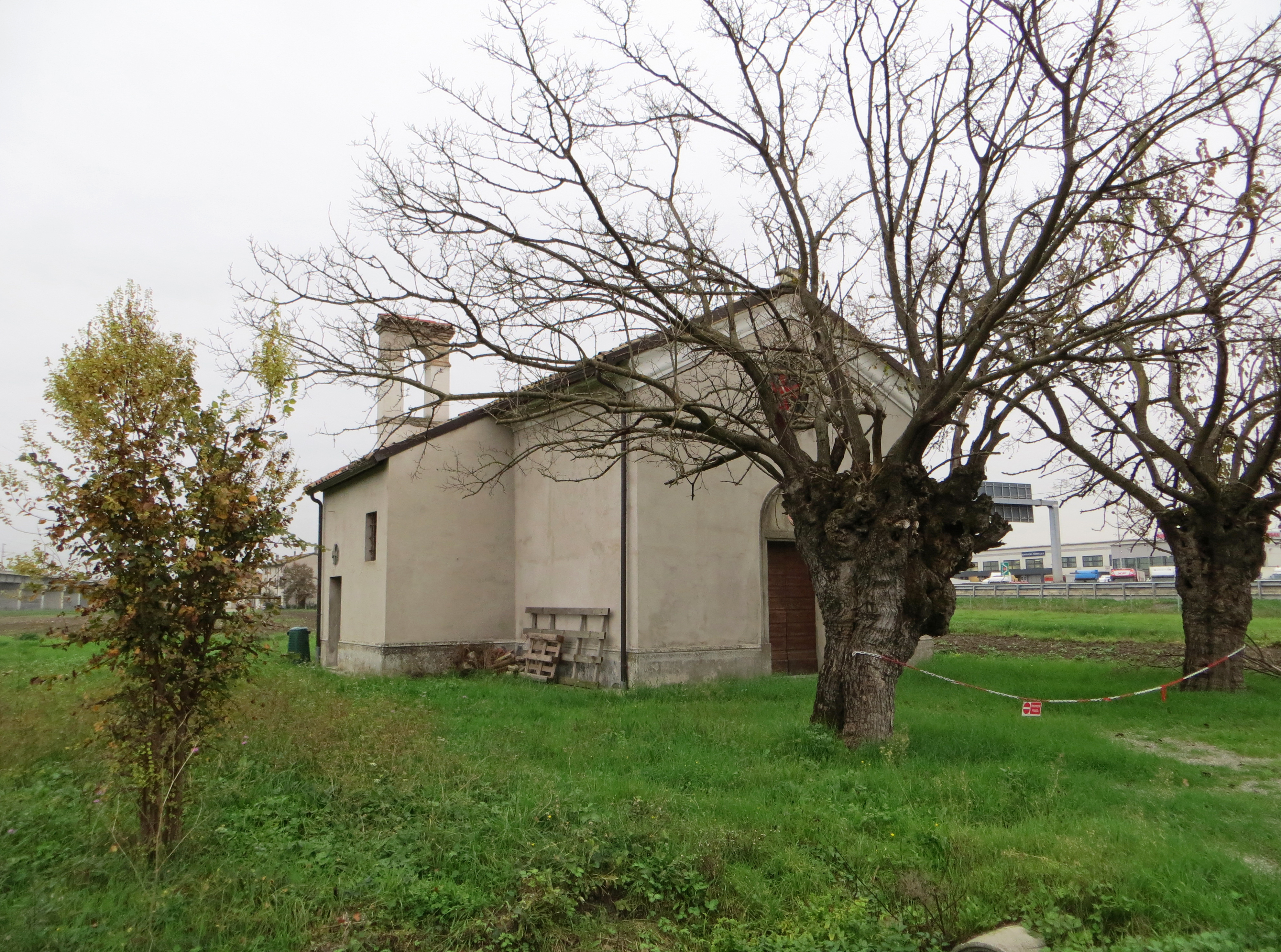 Facciata e lato nord dell'oratorio della Concezione di Maria Vergine